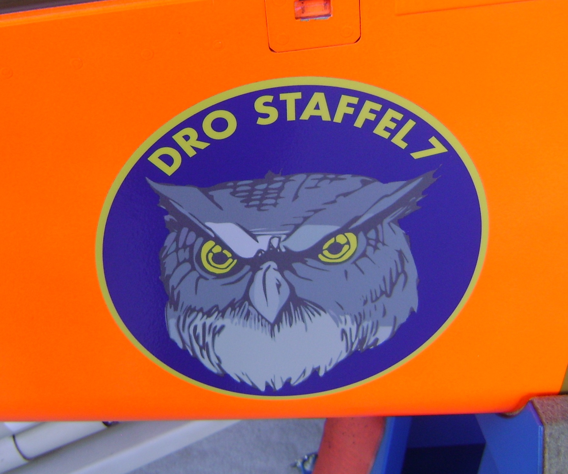 Badge Drohnenstaffel auf ADS-95